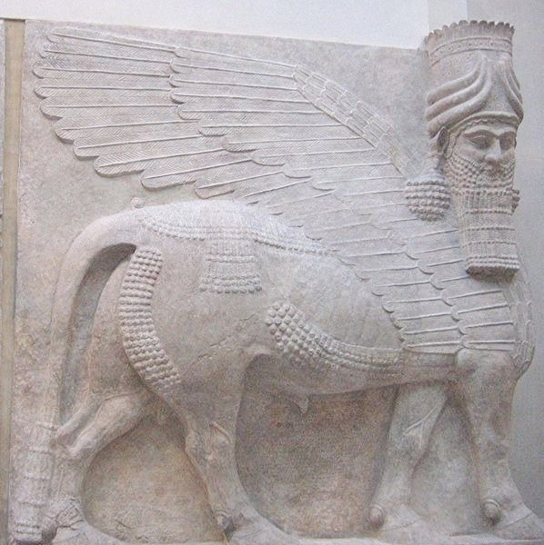 Taureau androcéphale ailé, gardien des portes du palais du roi assyrien Sargon II à Dur-Sharrukin, actuelle Khorsabad en Irak/ Musée du Louvre / Photo personnelle d'Urban, GFDL Urban 2004